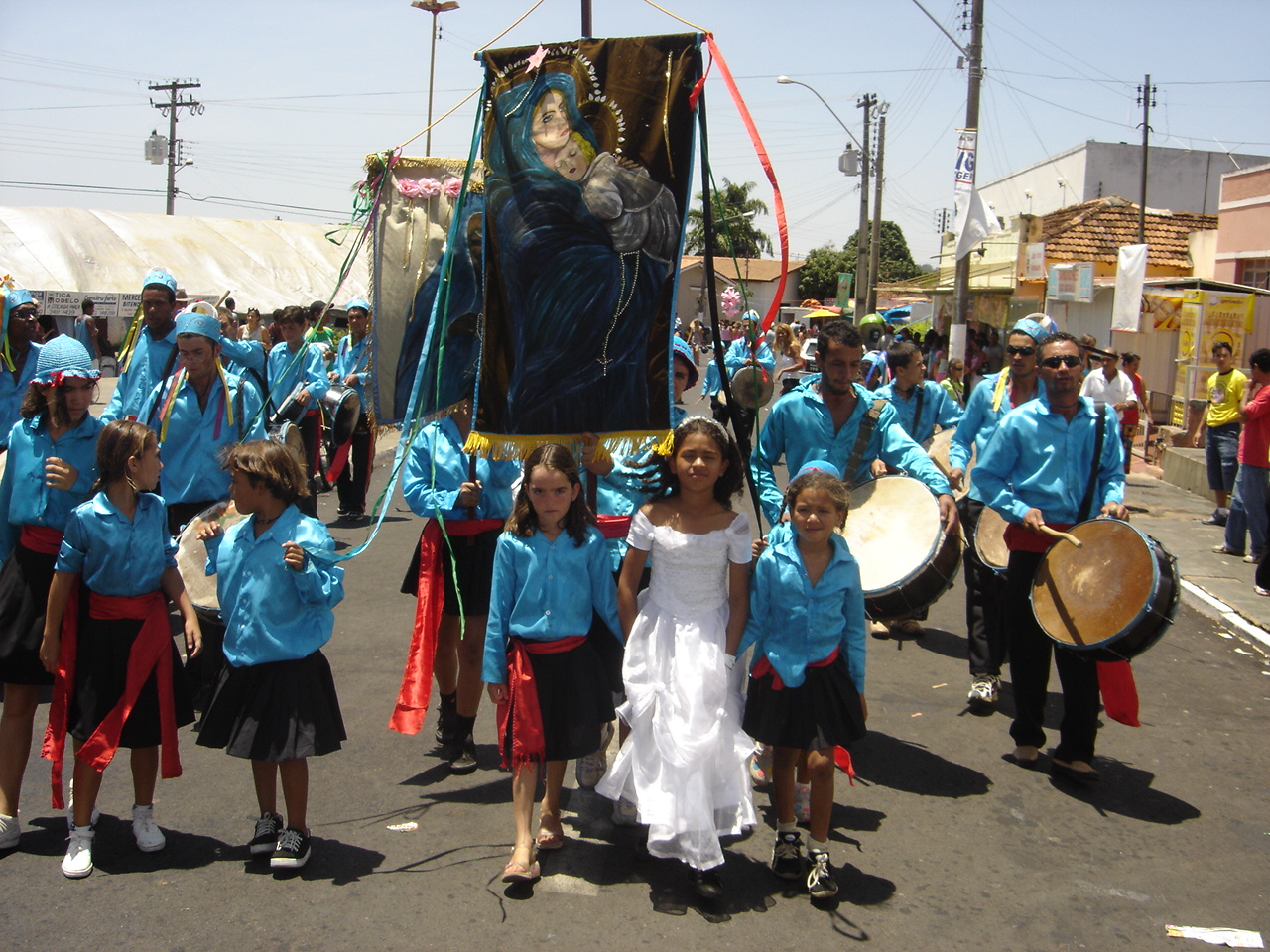 Um terno de congos de Catalão